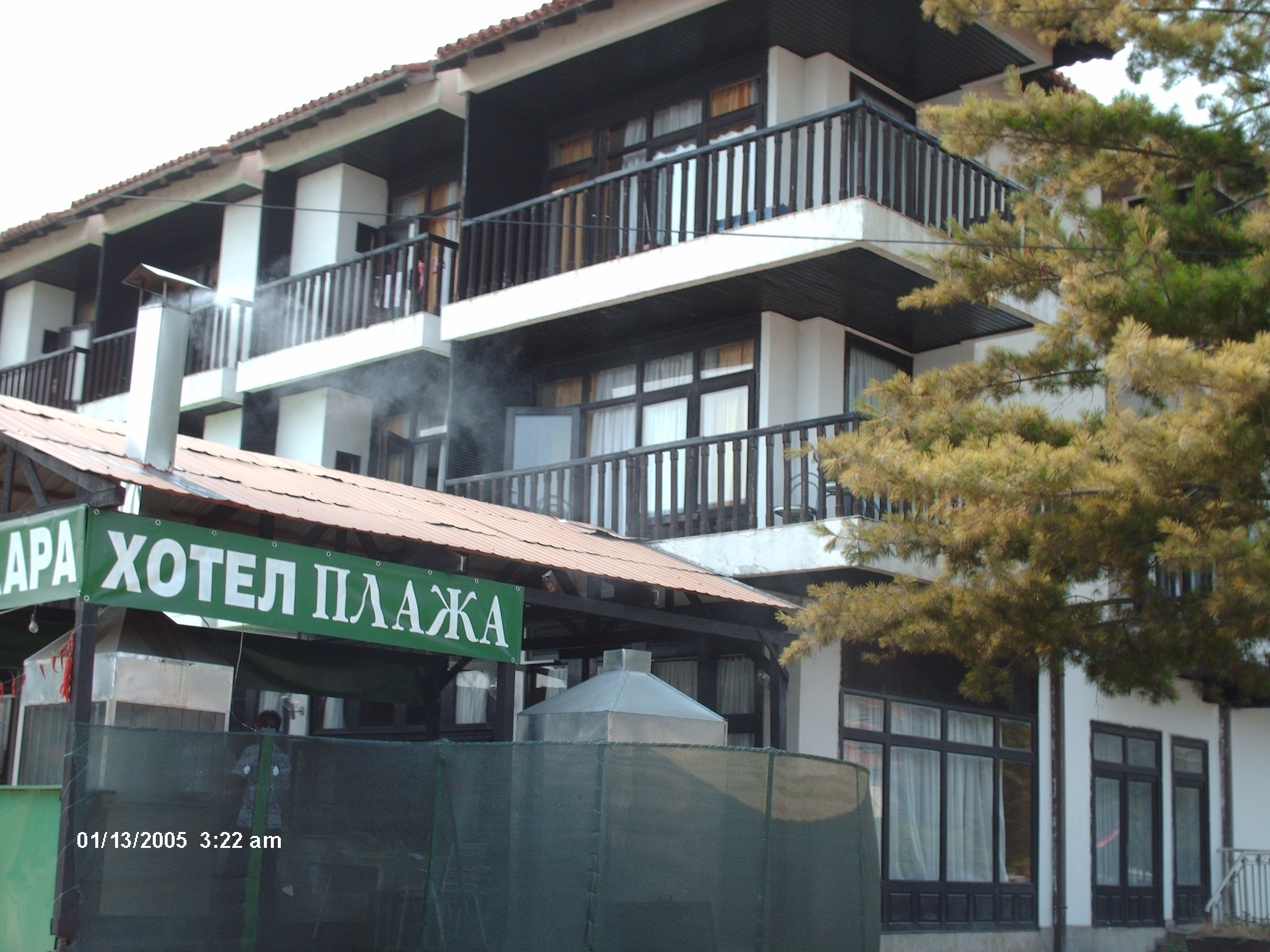 Hotelot Plaža vo Struga